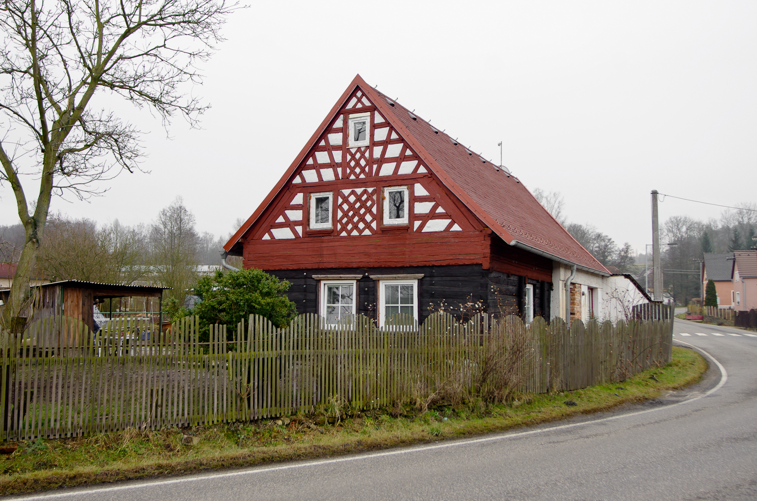 Šabina, okres Sokolov, roubené obytné stavení, v zadní části se zděným chlévem a hrázděným štítem